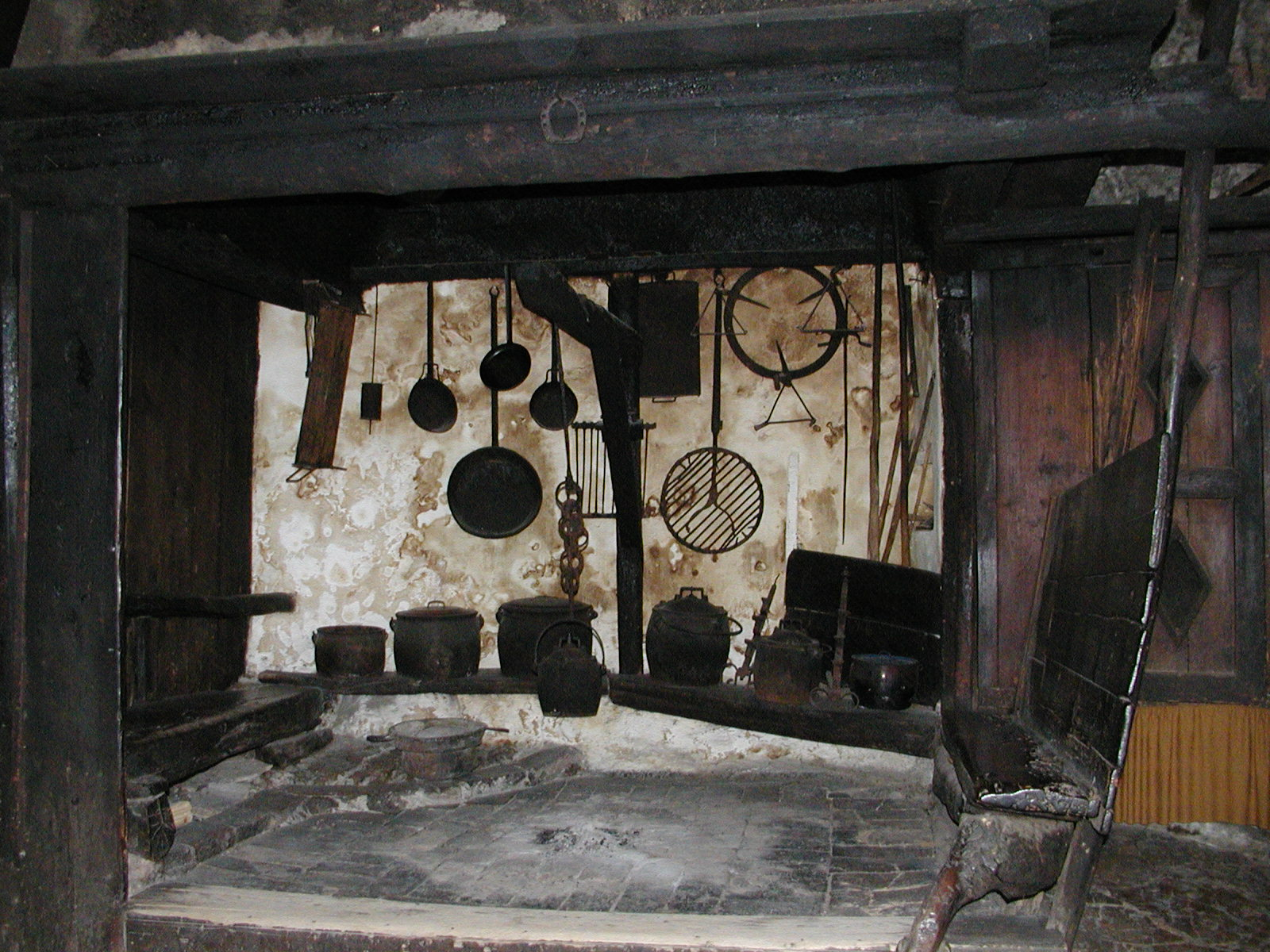 Alte Küche in der Eremitage Blaca (Insel Brač, Kroatien)